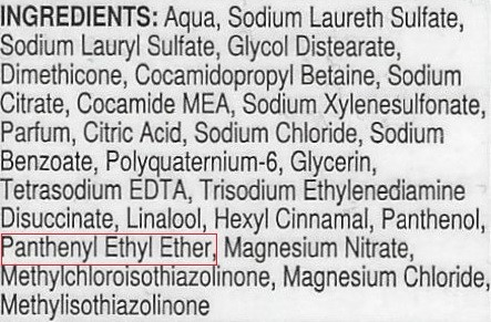 Zutatenliste vom Shampoo Pantene Pro-V mit pro v